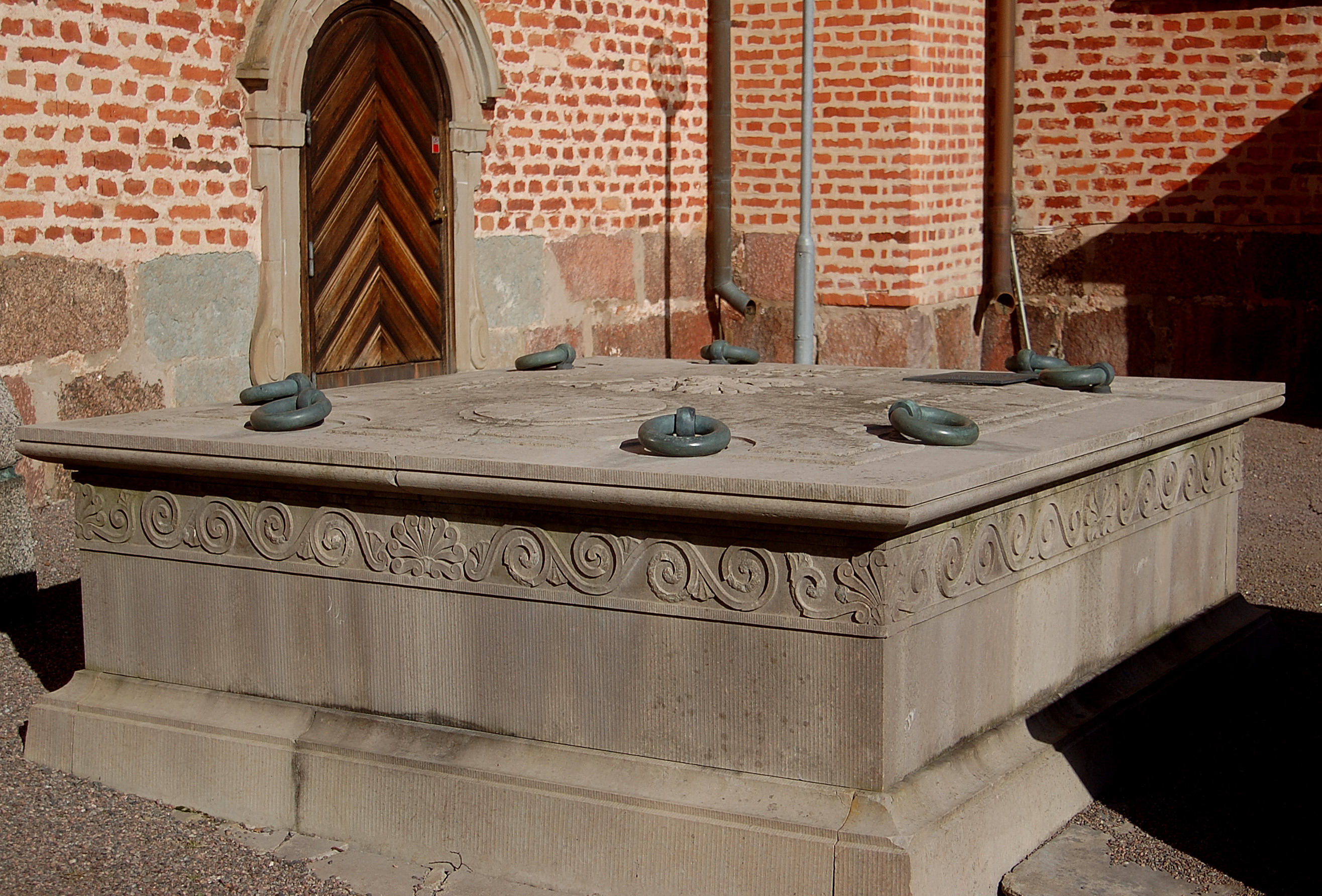 Gravplats för Albert Cassel och hustrun Augusta Reuterswärd utanför Landsförsamlingens kyrka i Askersund.